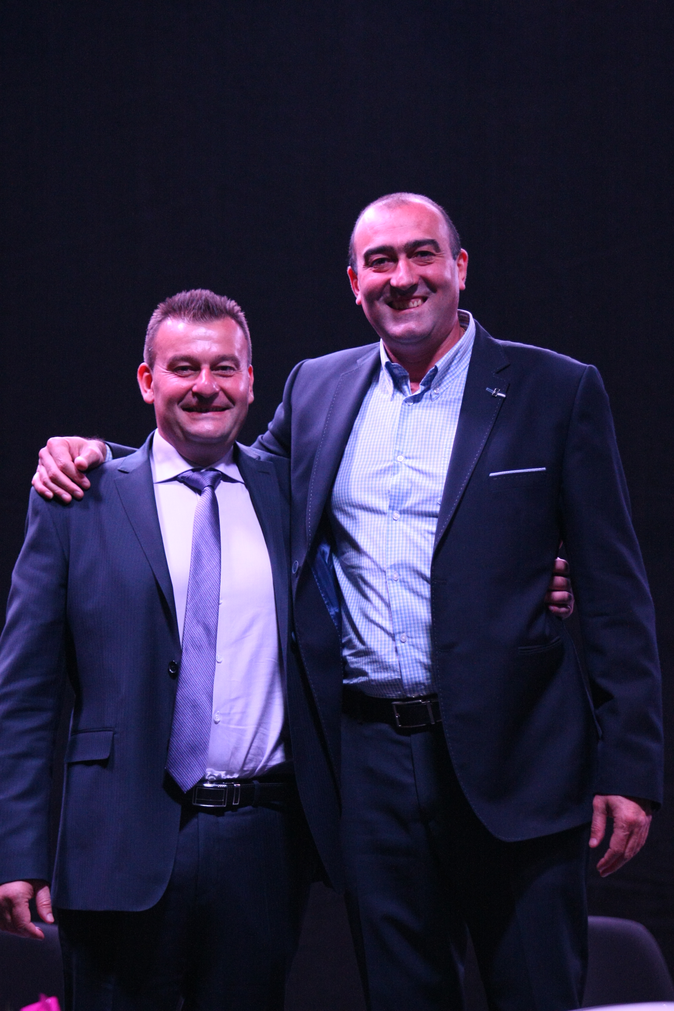 Кметът на Сливница Васко Стоилков и треньорът на волейболния клуб "Марек" Найден Найденов.